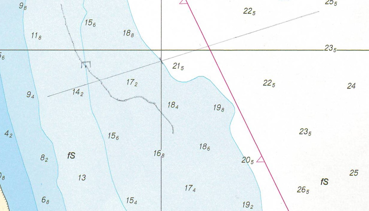 Izobātas. Bathymetry